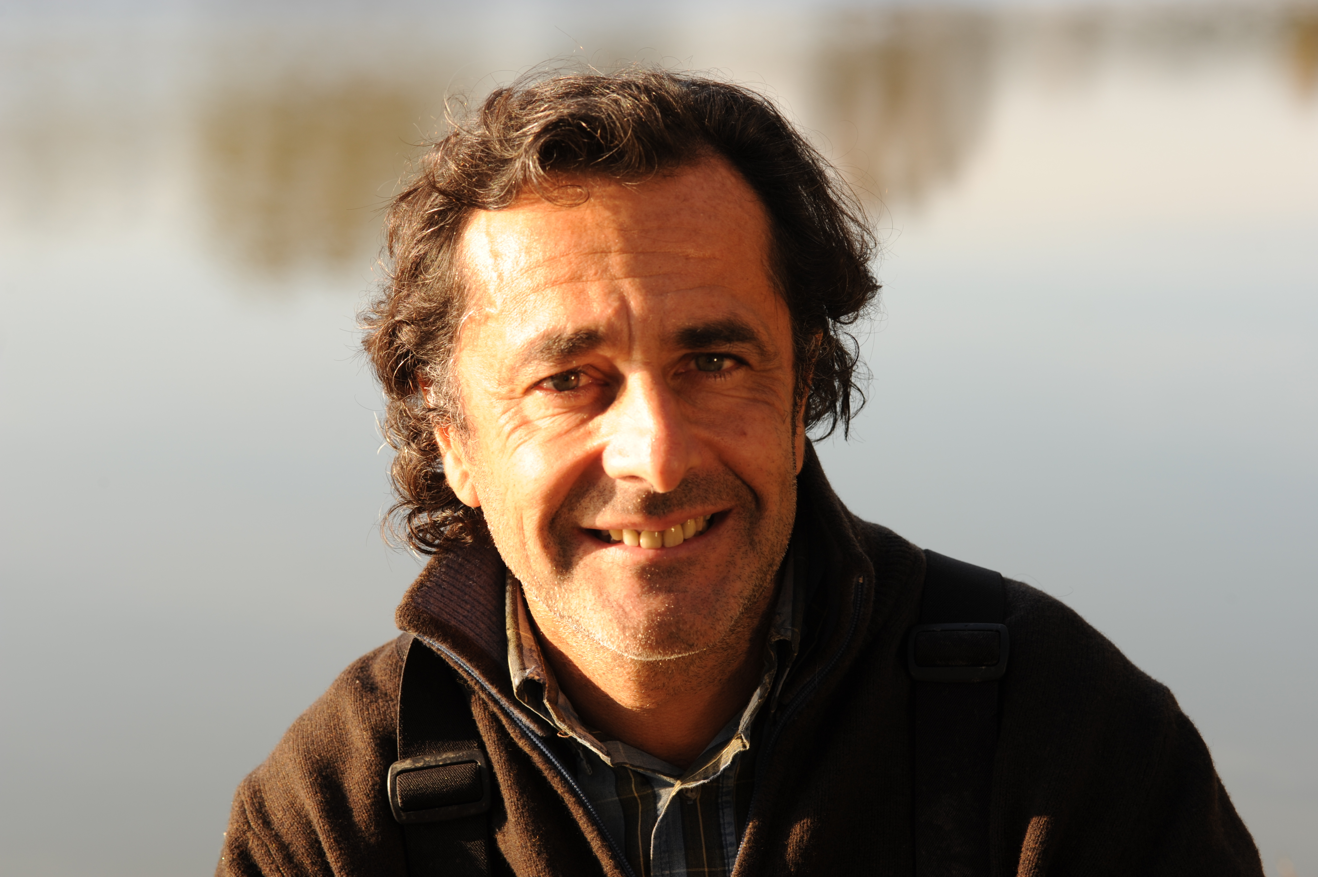 Nicolas Vanier, explorateur, 2011